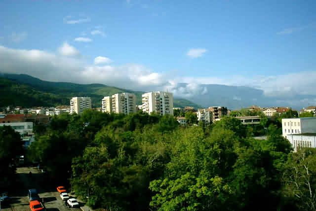 Petrich01.jpg